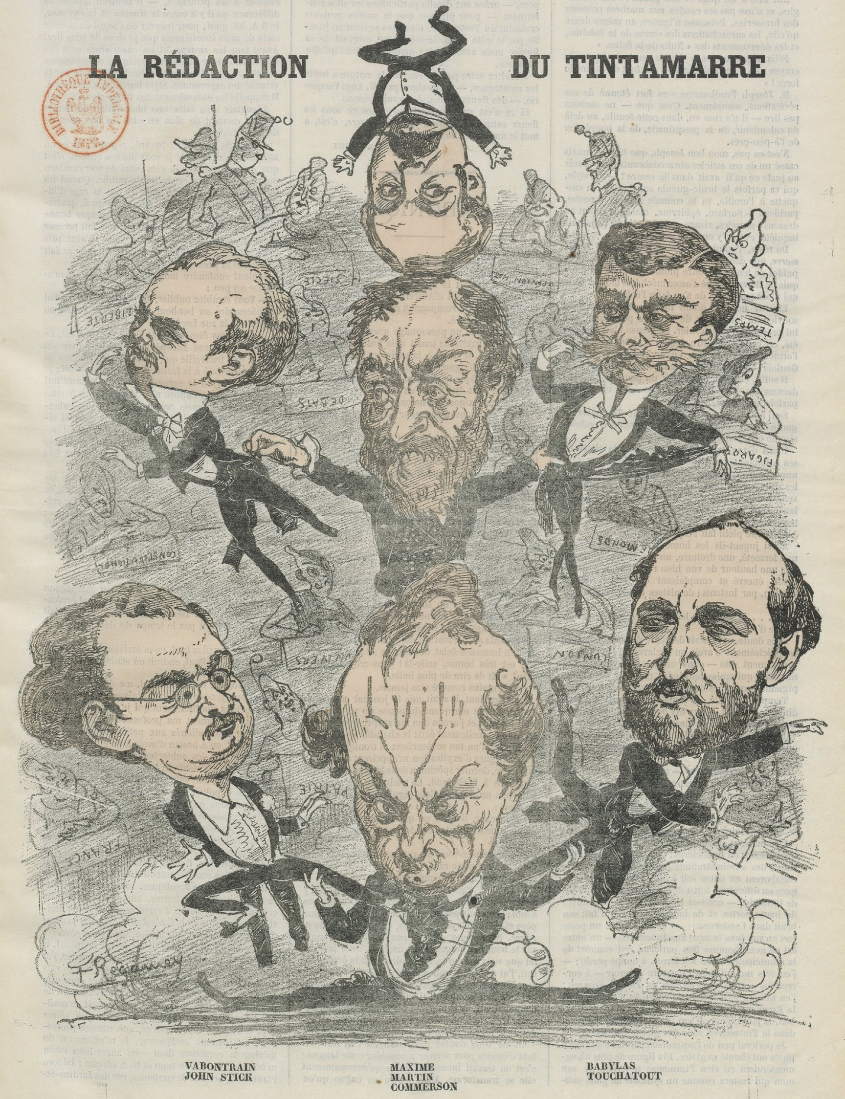 "La rédaction du Tintamarre".